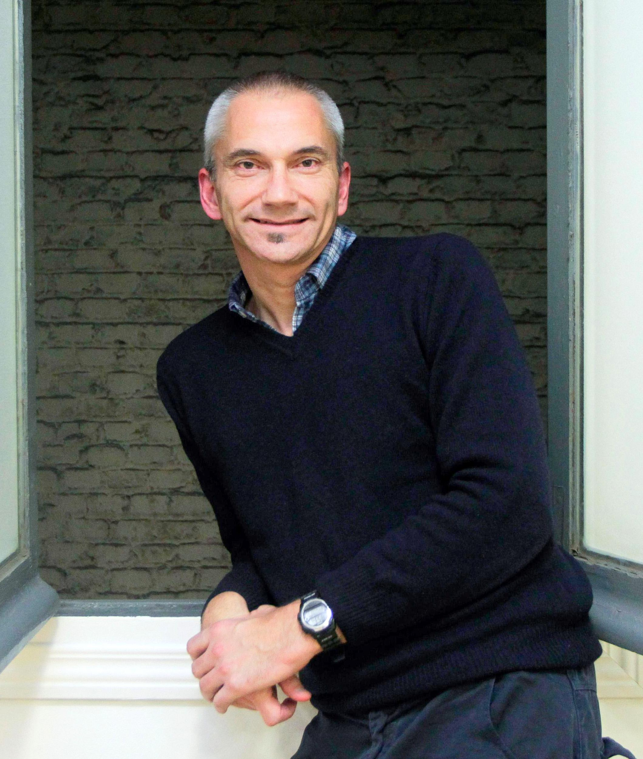 El dirigente de Sortu asegura que seguirá habiendo "gestos" de la izquierda abertzale con las víctimas de ETA. Que ETA no haya entregado las armas no supone una amenaza "en absoluto", dice. "La decisión de no utilizar la violencia es definitiva". "El proceso de paz está bloqueado. No hay voluntad en el PP"